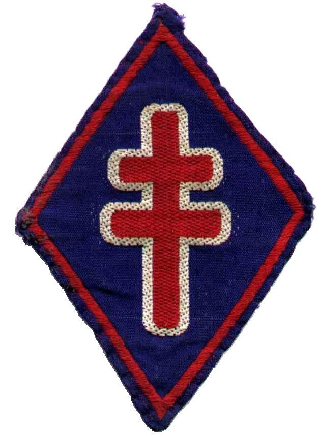 Insigne en tissu de la 1re DFL